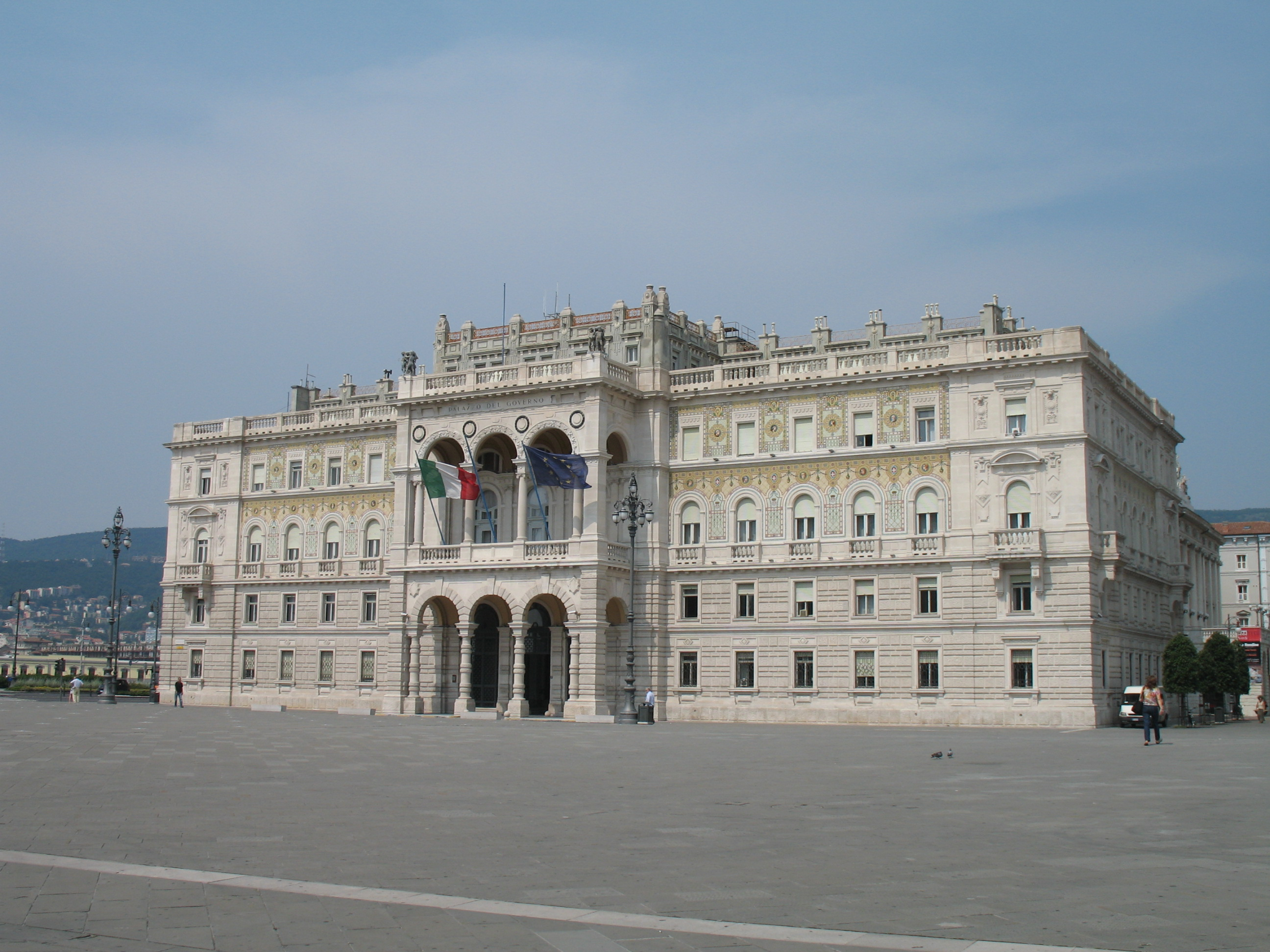 Immagine da Trieste, Friuli-Venezia Giulia, Italia.